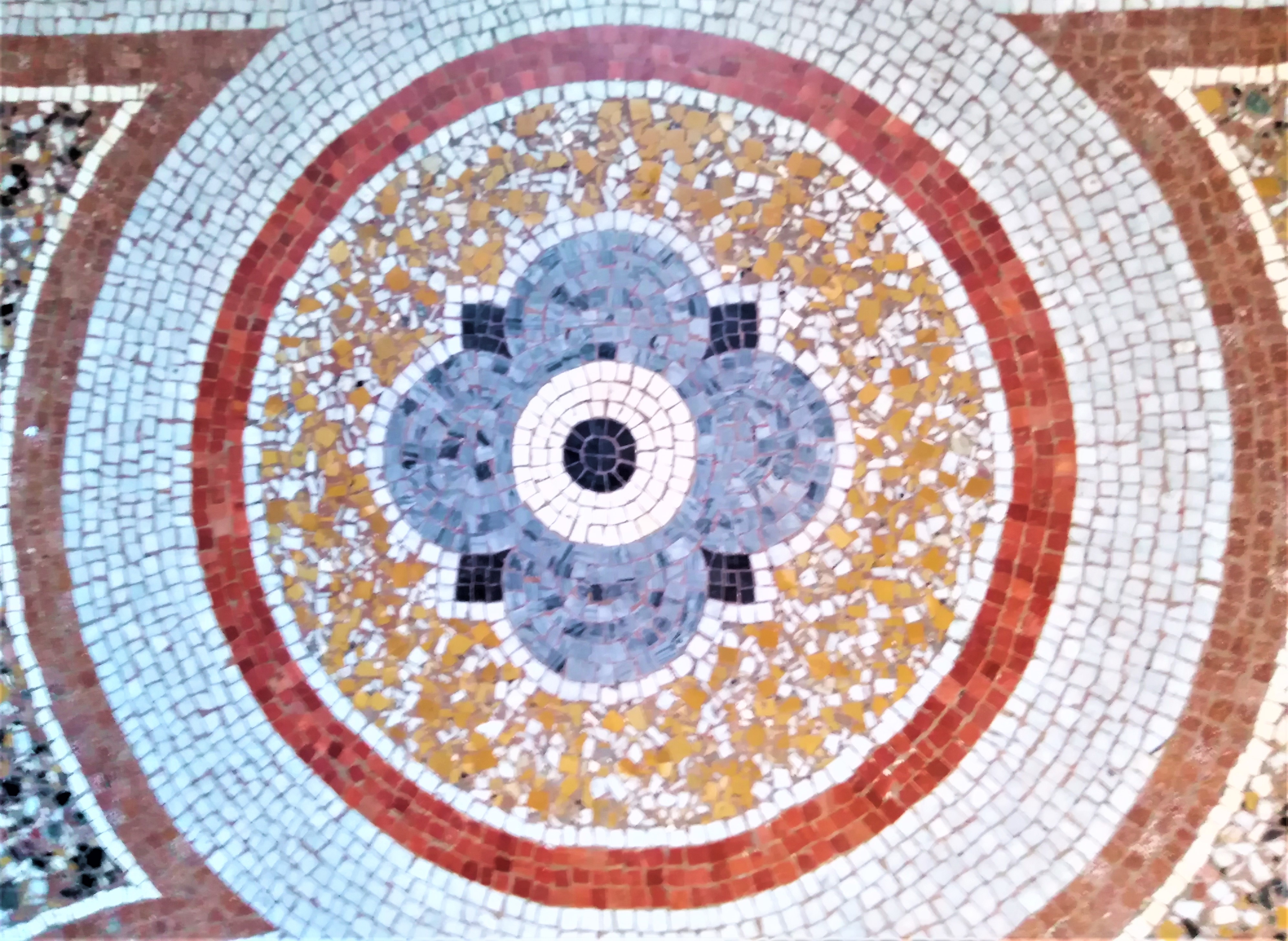 Mosaique château de Chaulnes